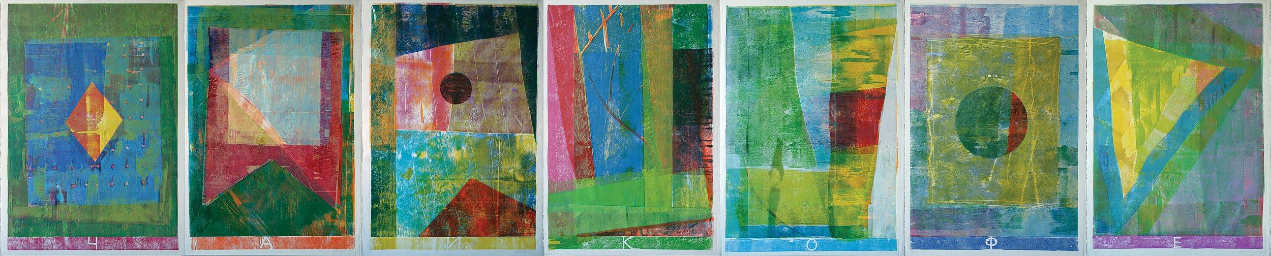 Гравюра на фанере. 100x490. 1997 г.